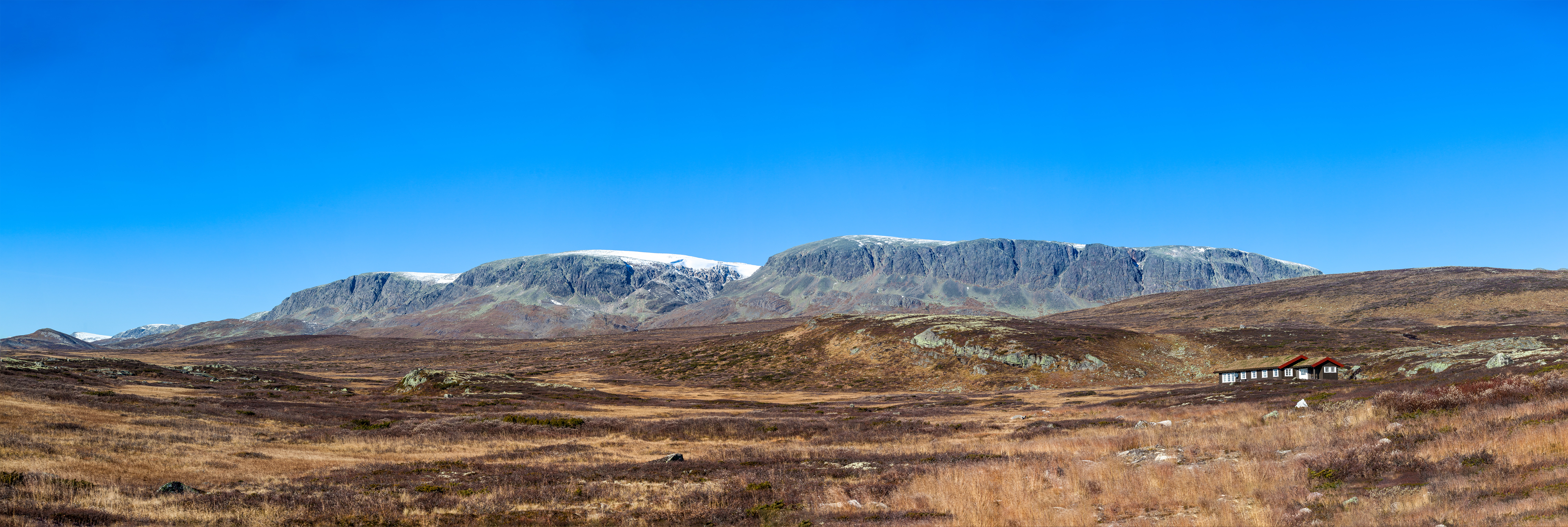 Hallingskarvet sett fra hytteområdet ved Ustaoset